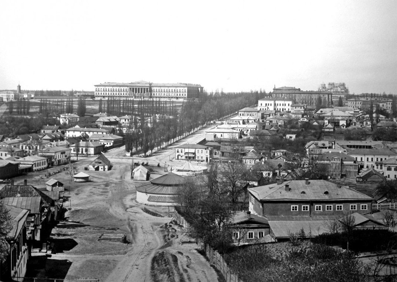 Бессарабська площа, сучасний бульвар Шевченка і Круглоуніверситетська вулиця